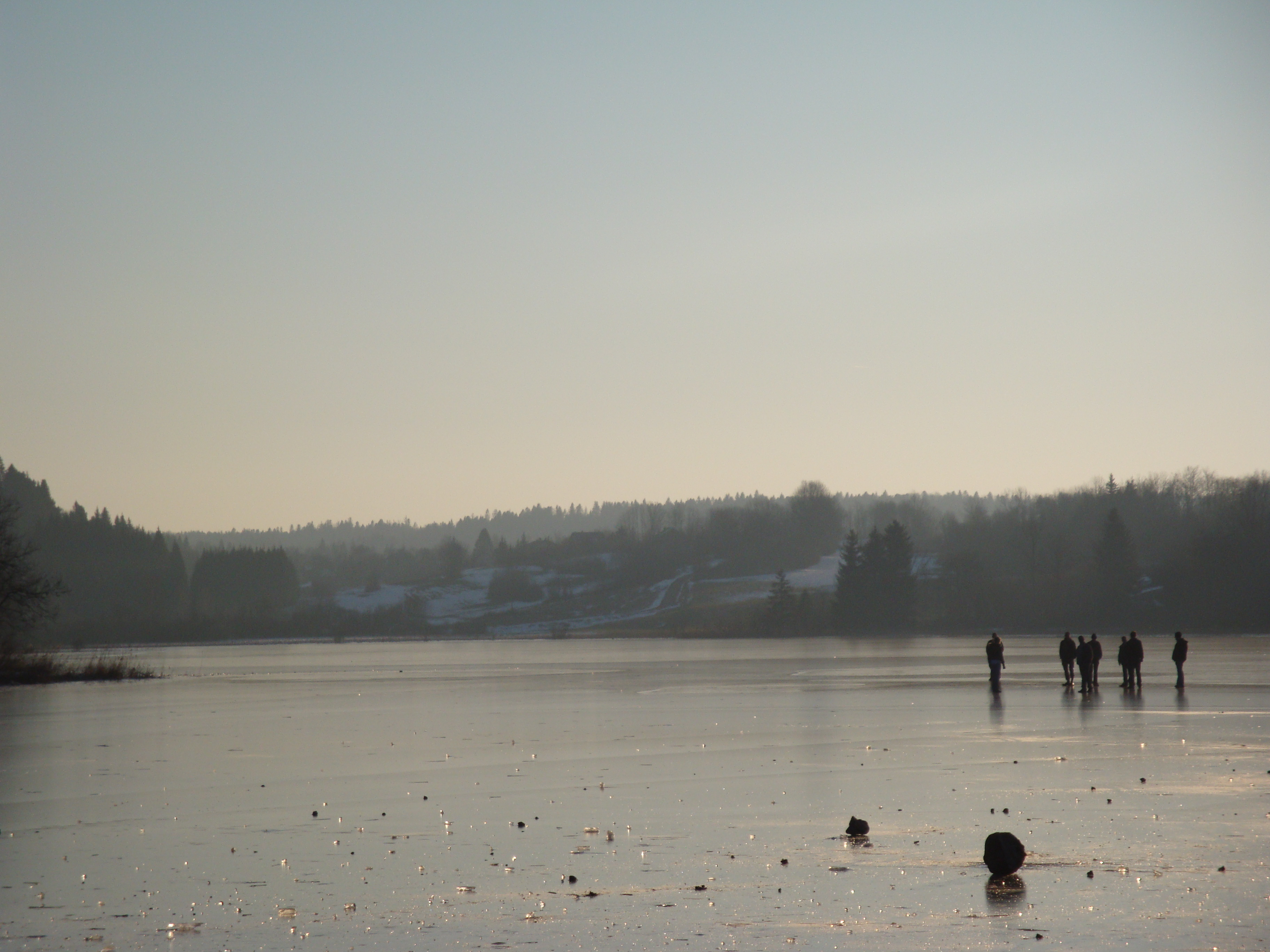 Lac d'Etival (Jura) gelé